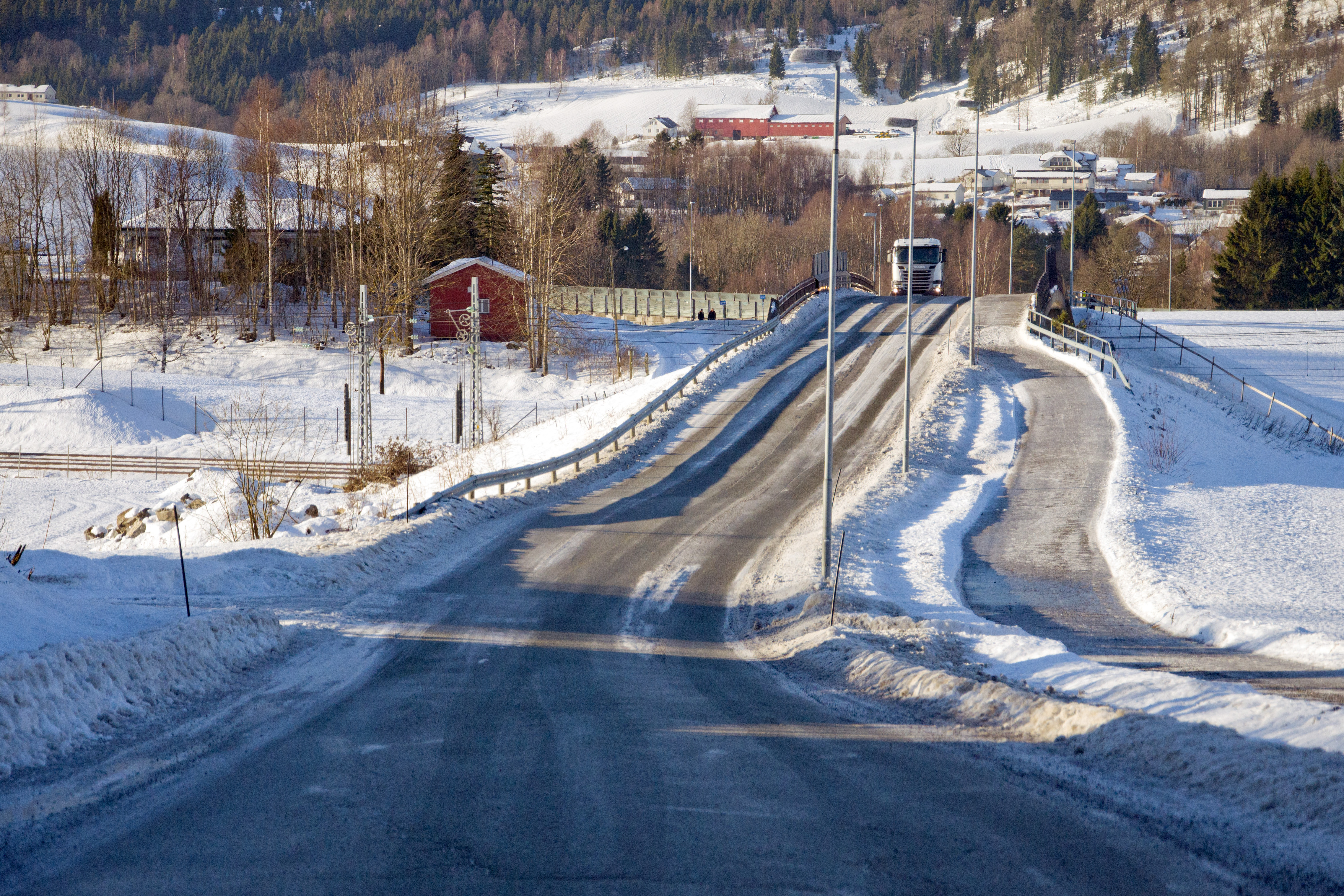 Fylkesvei 956 Gutugata over Vestfoldbanen